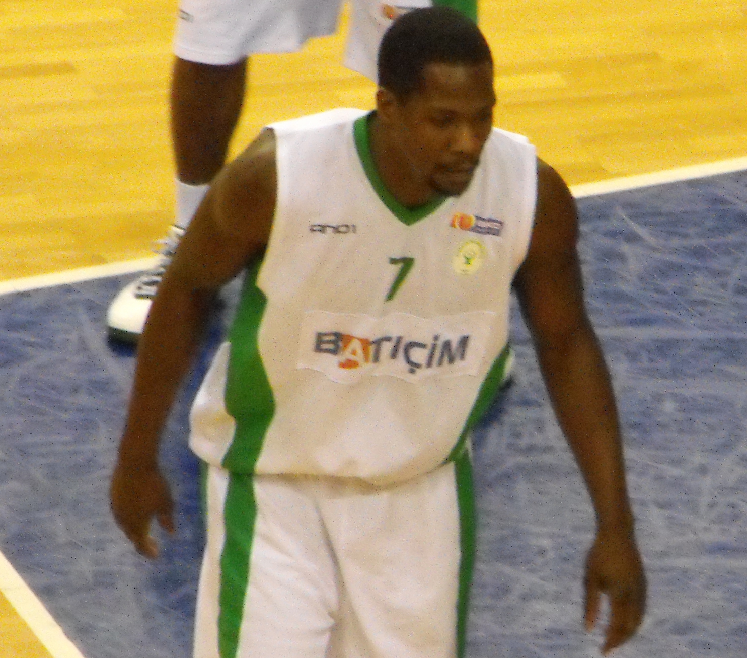 Bornova Belediye-Efes Pilsen maçı Kedrick Brown Kedrick Brown playing for Bornova (detail).